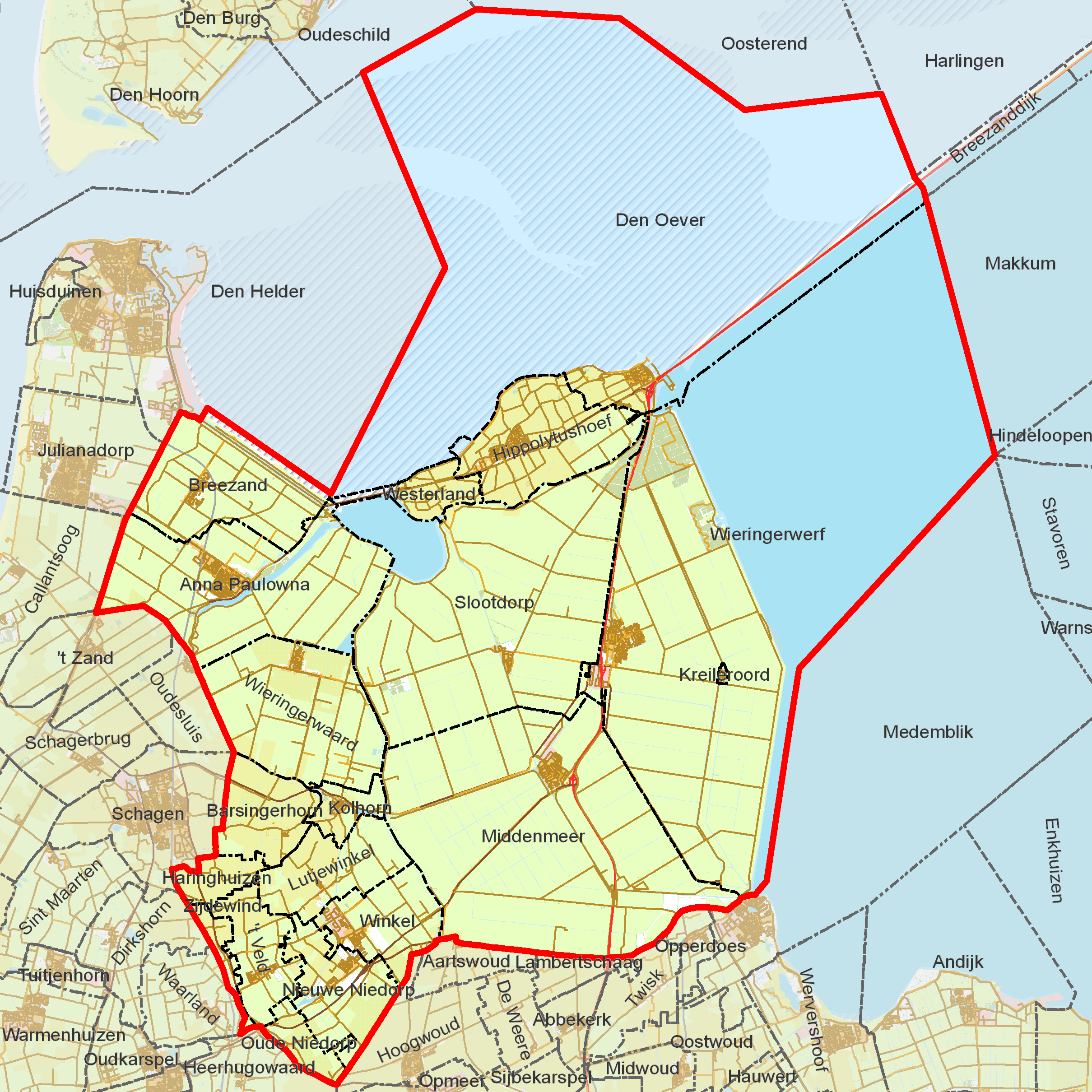 BAG woonplaatsen - Gemeente Hollands Kroon.png